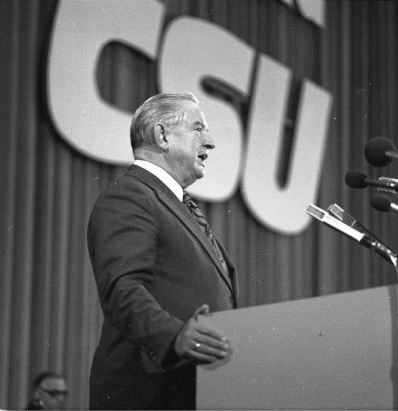 CSU-Parteitag 1975 in der Bayernhalle, München (Alfons Goppel)